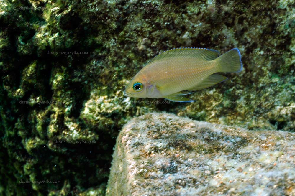 Variabilichromis juvénile à Mvuna island.